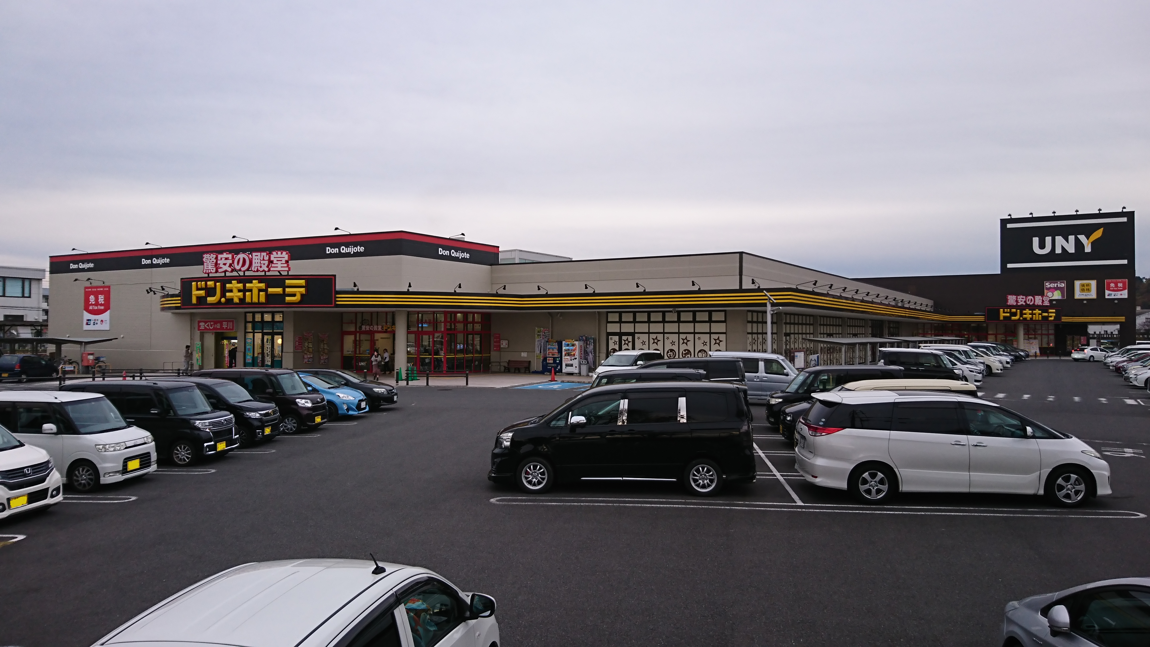 ドン・キホーテユニー可児店概観